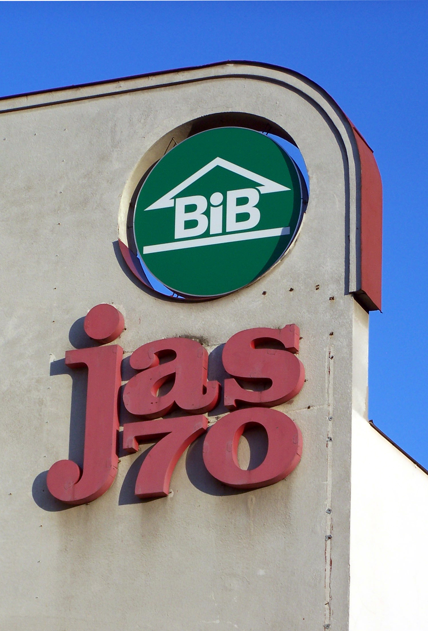 Detail bývalého kina Jas 70 od Karla Řepy.